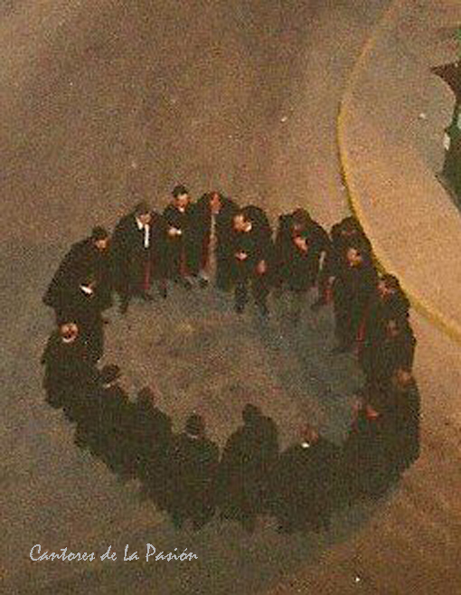 Formación típica para el canto